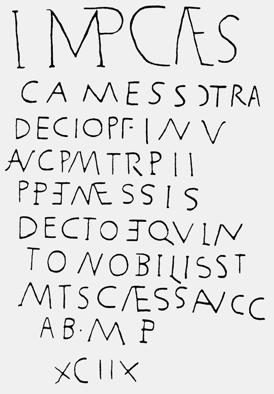 Der Meilenstein an der römischen Staatsstraße Via Raetia von Verona über Innsbruck nach Augsburg erhielt besondere Bedeutung, als der Altertumswissenschaftler Theodor Mommsen (1817-1903) dessen Inschrift CIL III, 5988 und die auf einem zweiten Stein irrtümlich als Hinweis auf eine fiktive Via Decia deutete, einer angeblichen Querverbindung von Bregenz nach Innsbruck.